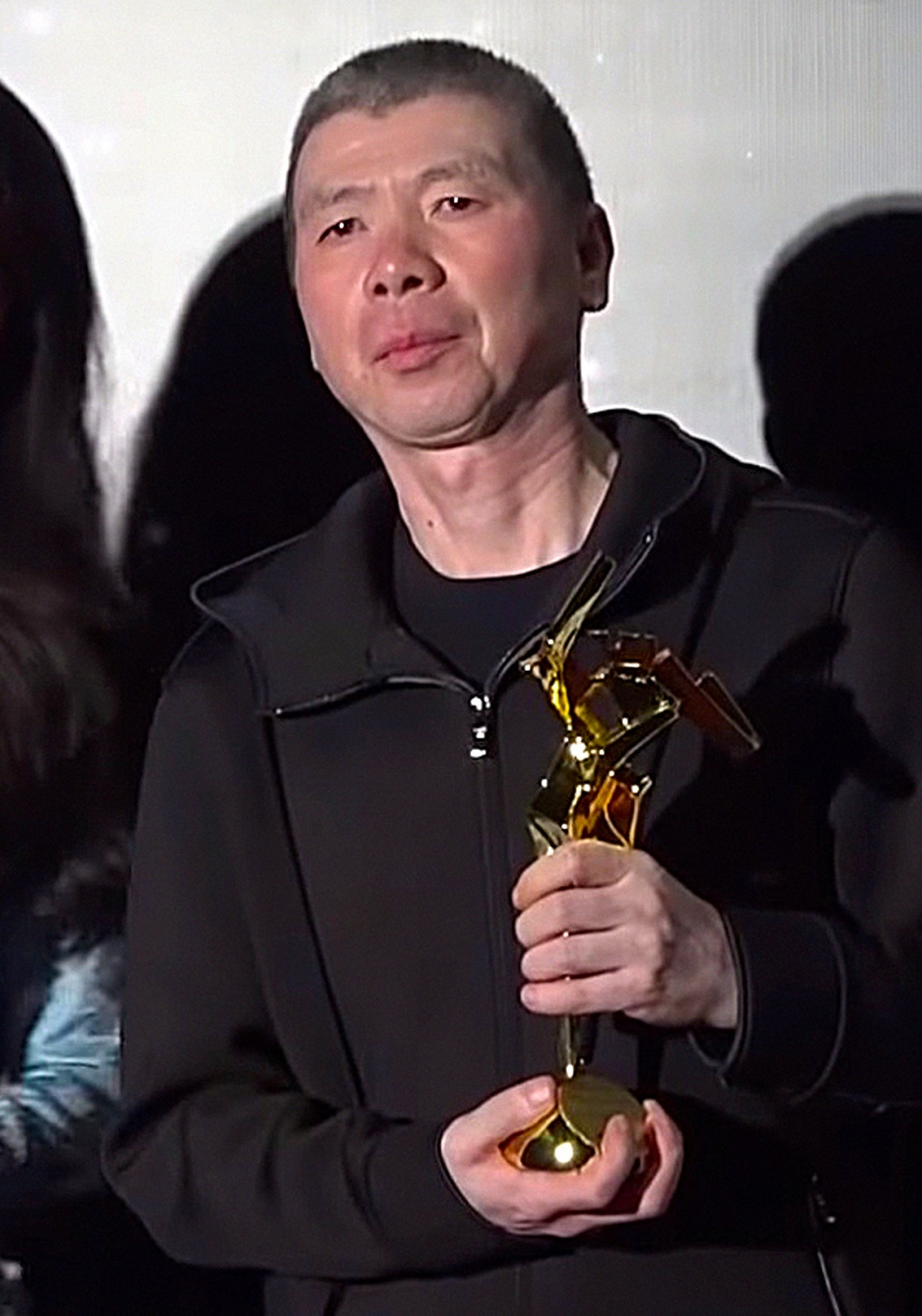 中文（香港）: 《第十一屆亞洲電影大獎》